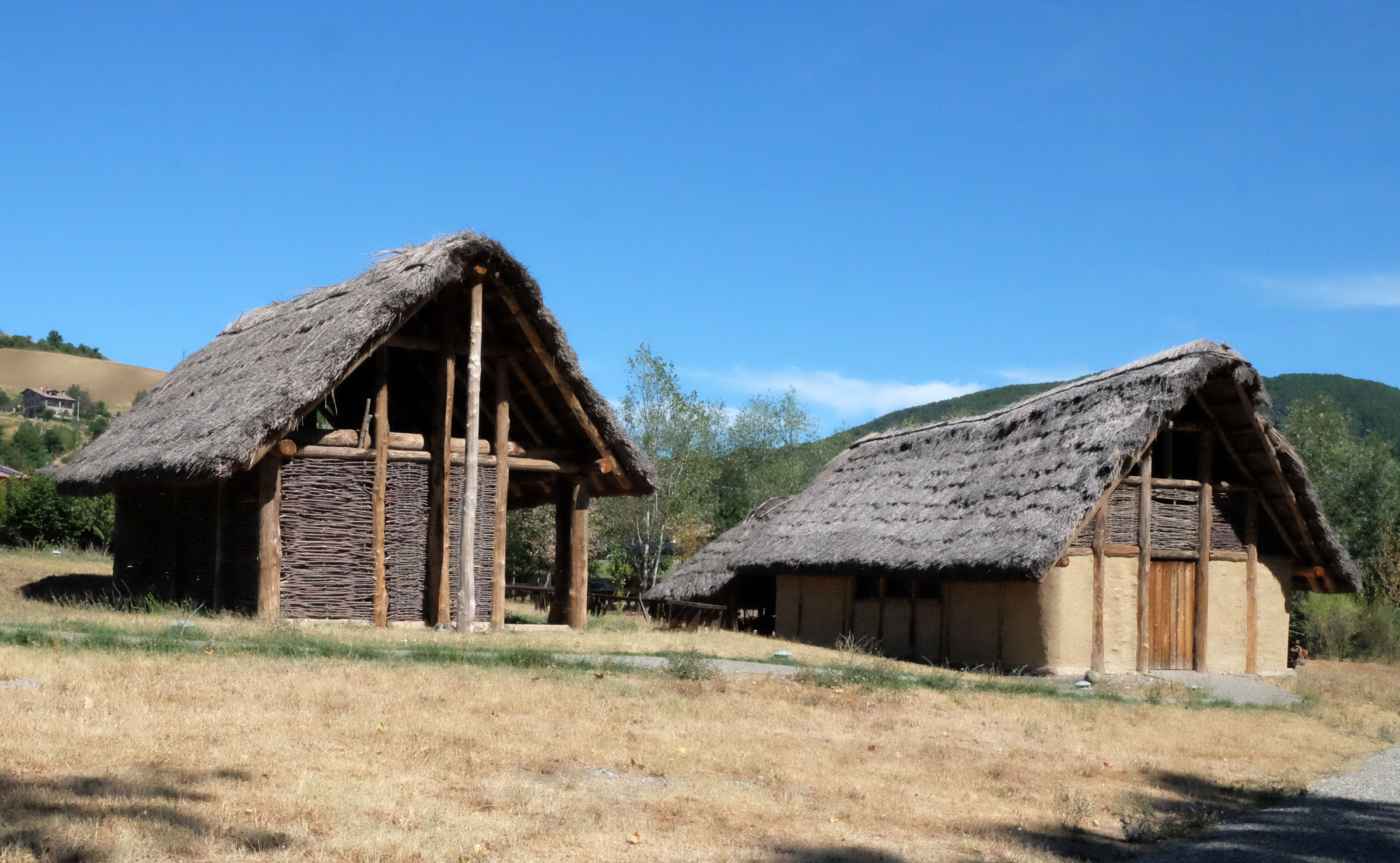 Parco Archeologico Villaggio Neolitico di Travo This is a photo of a monument which is part of cultural heritage of Italy. italy)